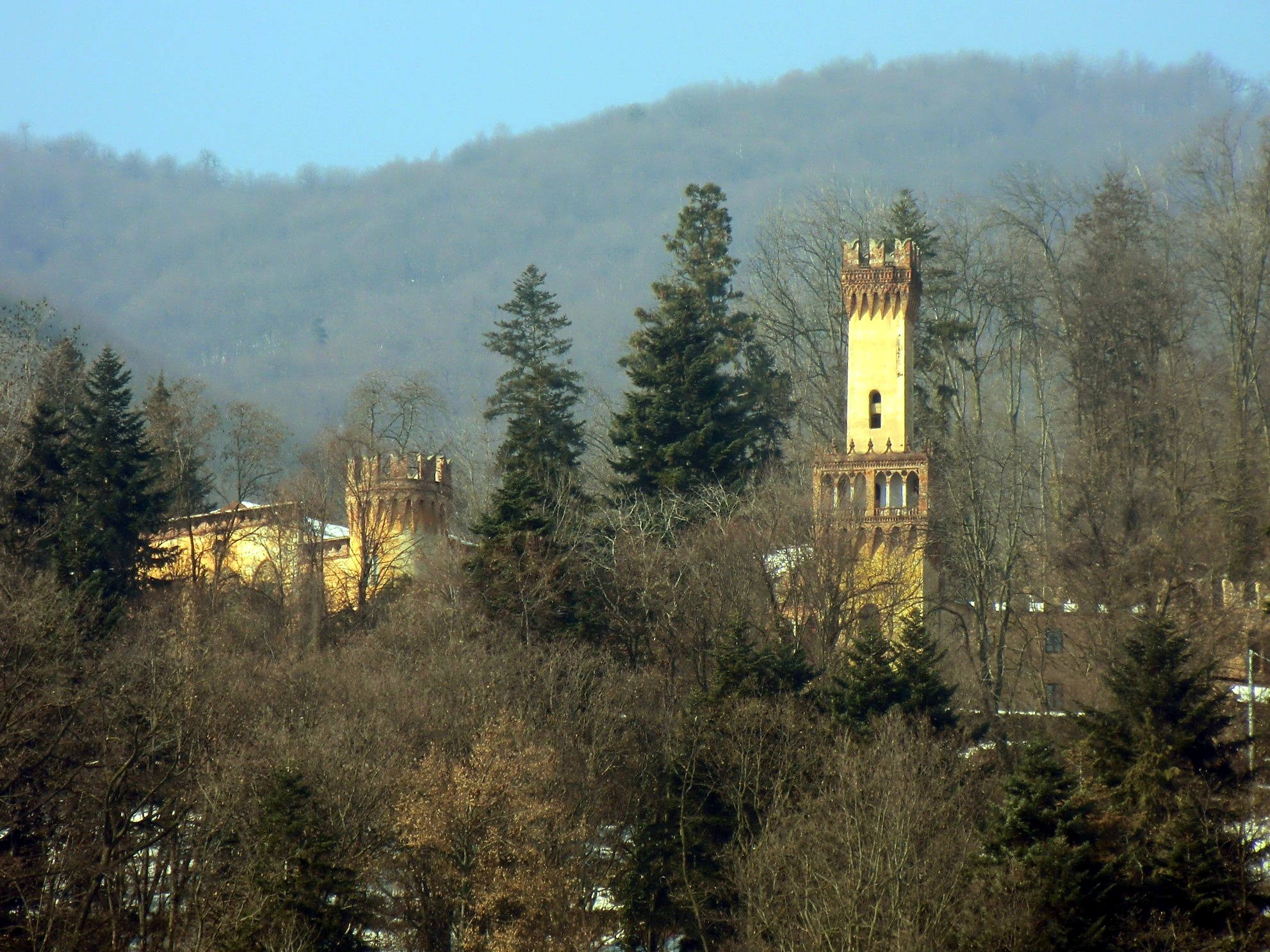 Busca (Cuneo): castello del Roccolo (sec. XIX)